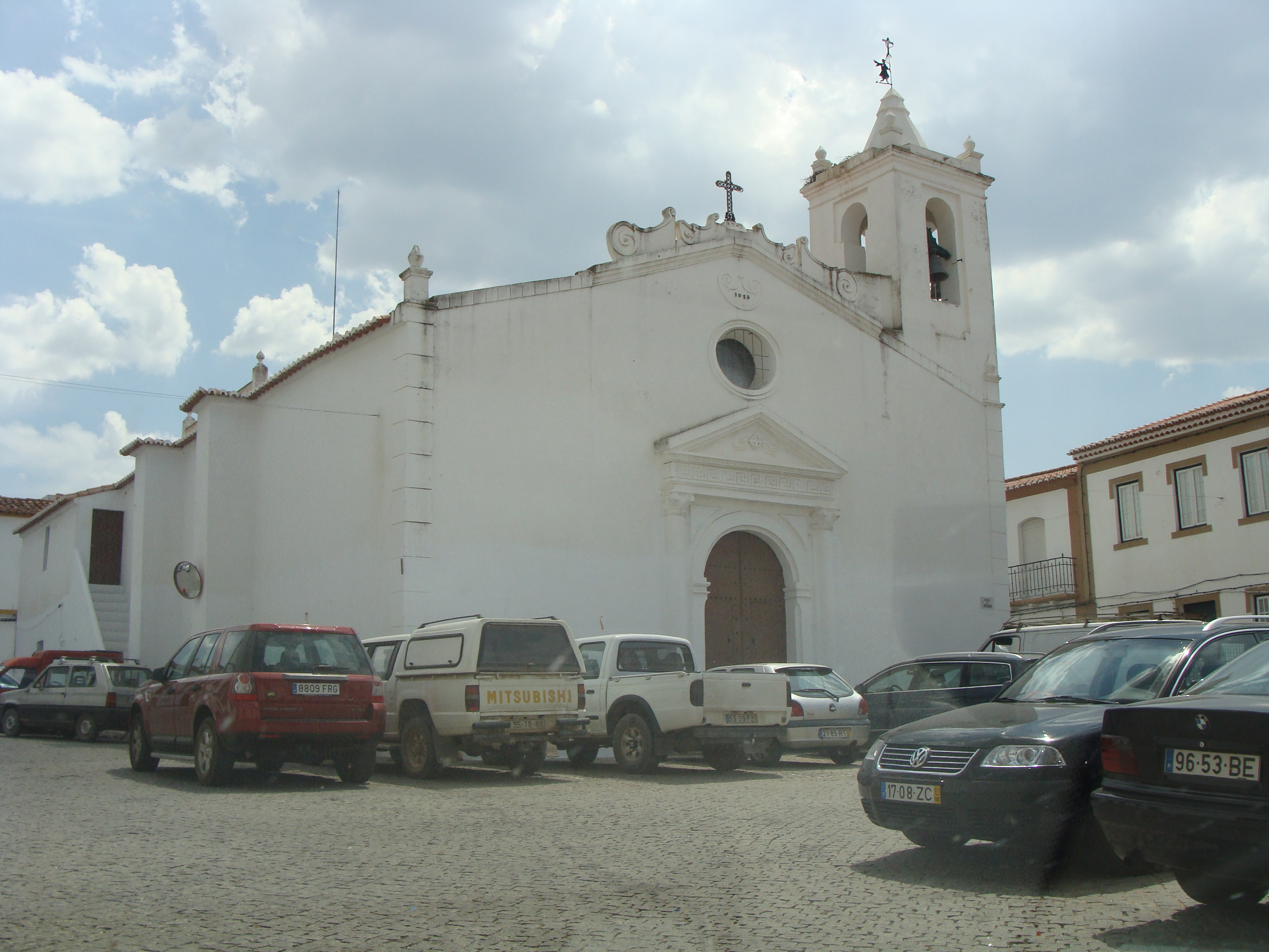 Eglise de Barrancos